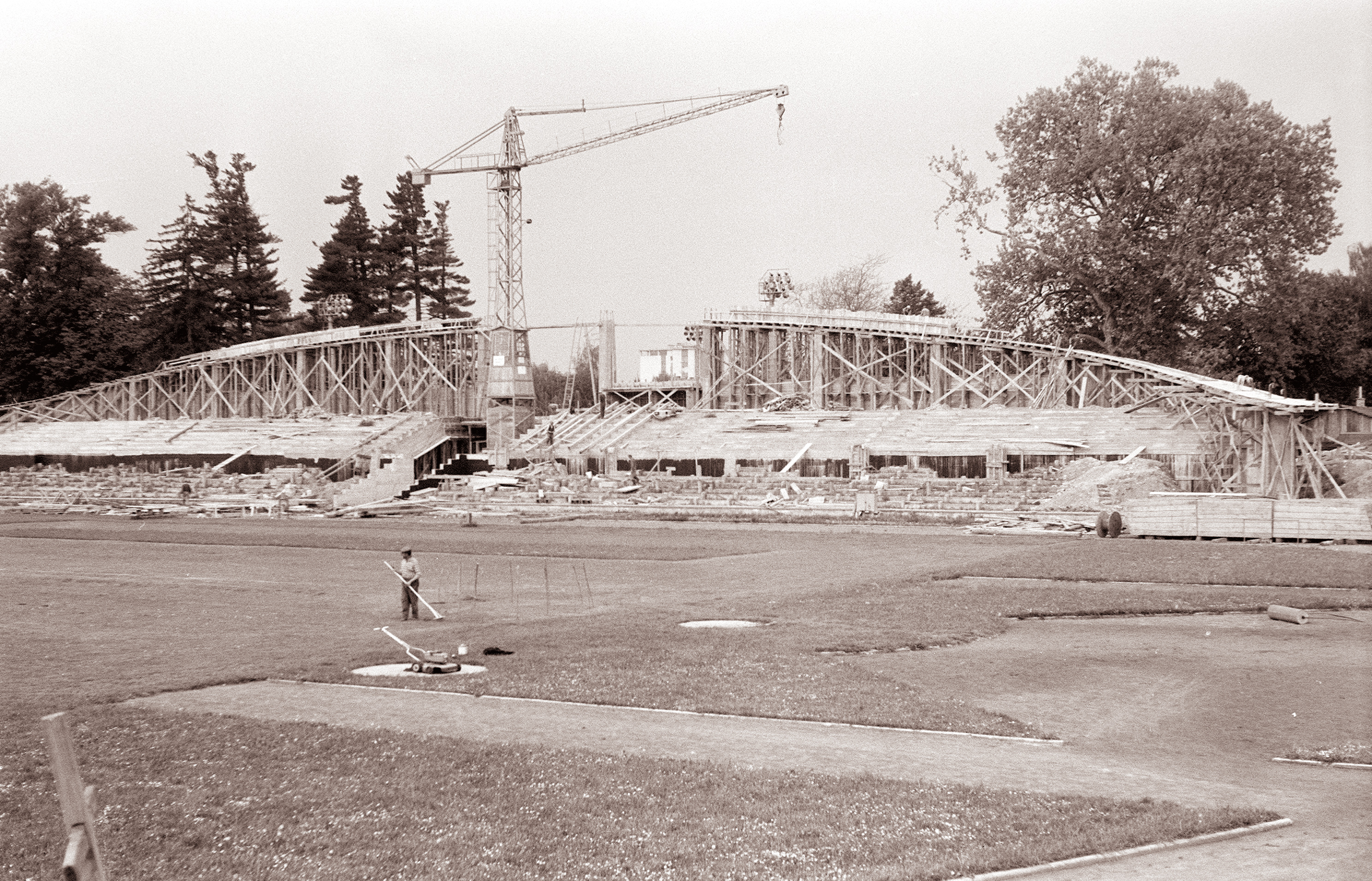 Gradnja tribune na stadionu Ljudski vrt